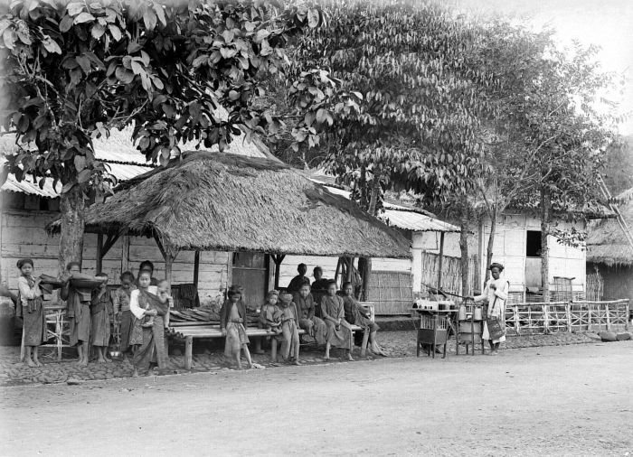 Negatief. Een eettentje te Singaparna, Java